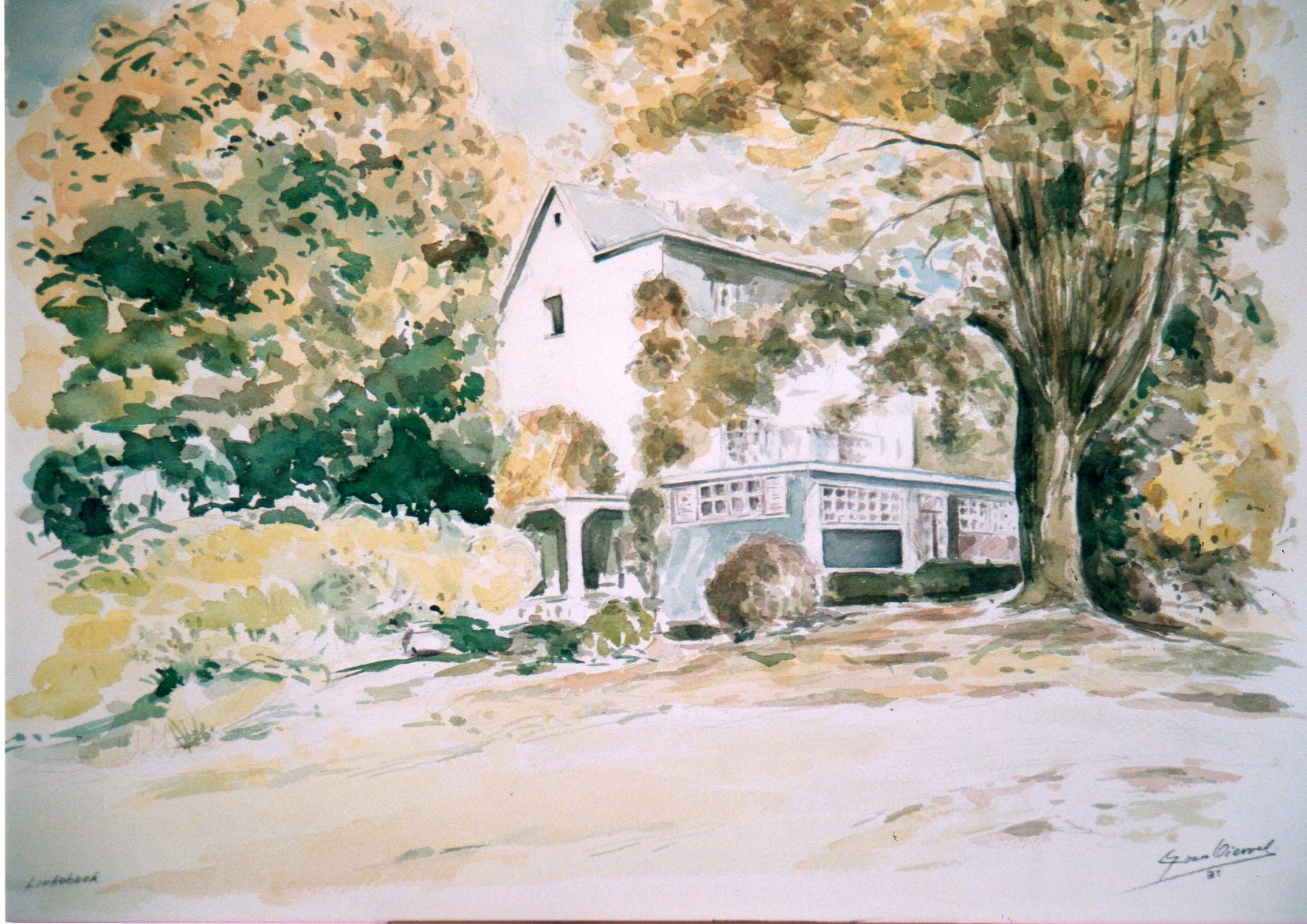 "Les Roches", à Linkebeek (Vlaams Brabant, Belgique) villa du peintre Lismonde, aquarelle par Léon van Dievoet (1907-1993), architecte, peintre, graveur, aquarelliste (46 cm x 61 cm), 1981.